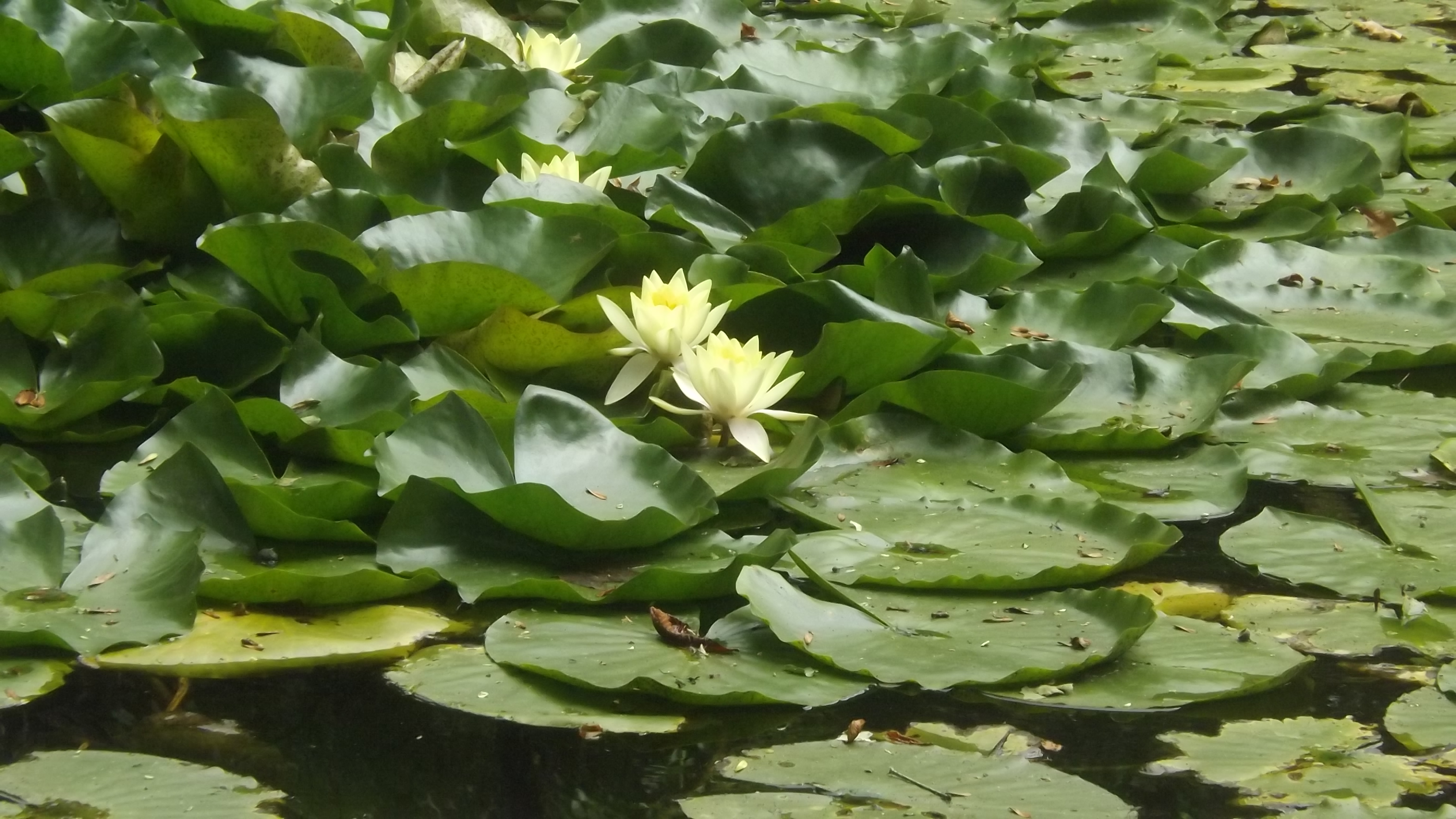 Vácrátóti botanikuskert, tündérrózsák